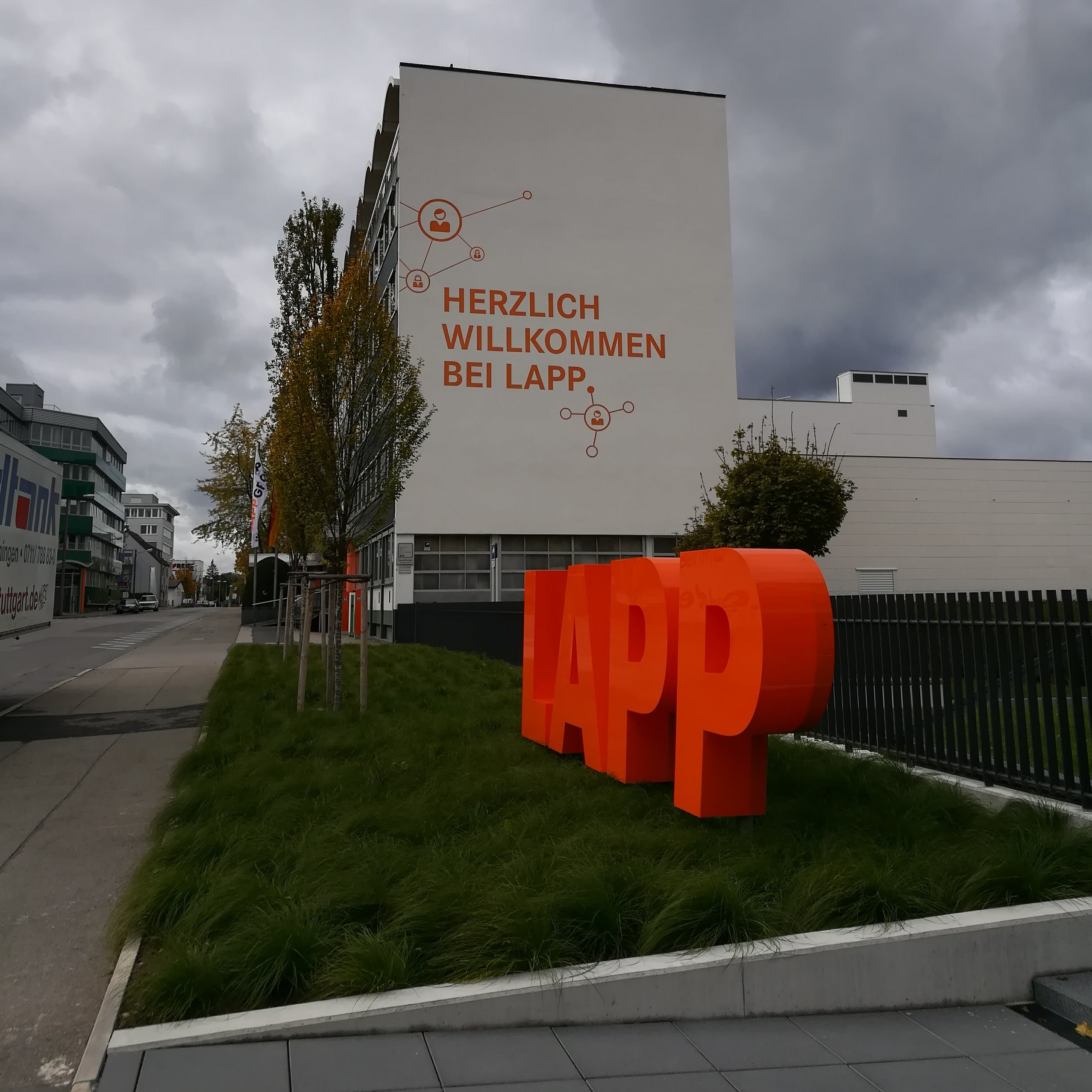 Lapp in Stuttgart Vaihingen